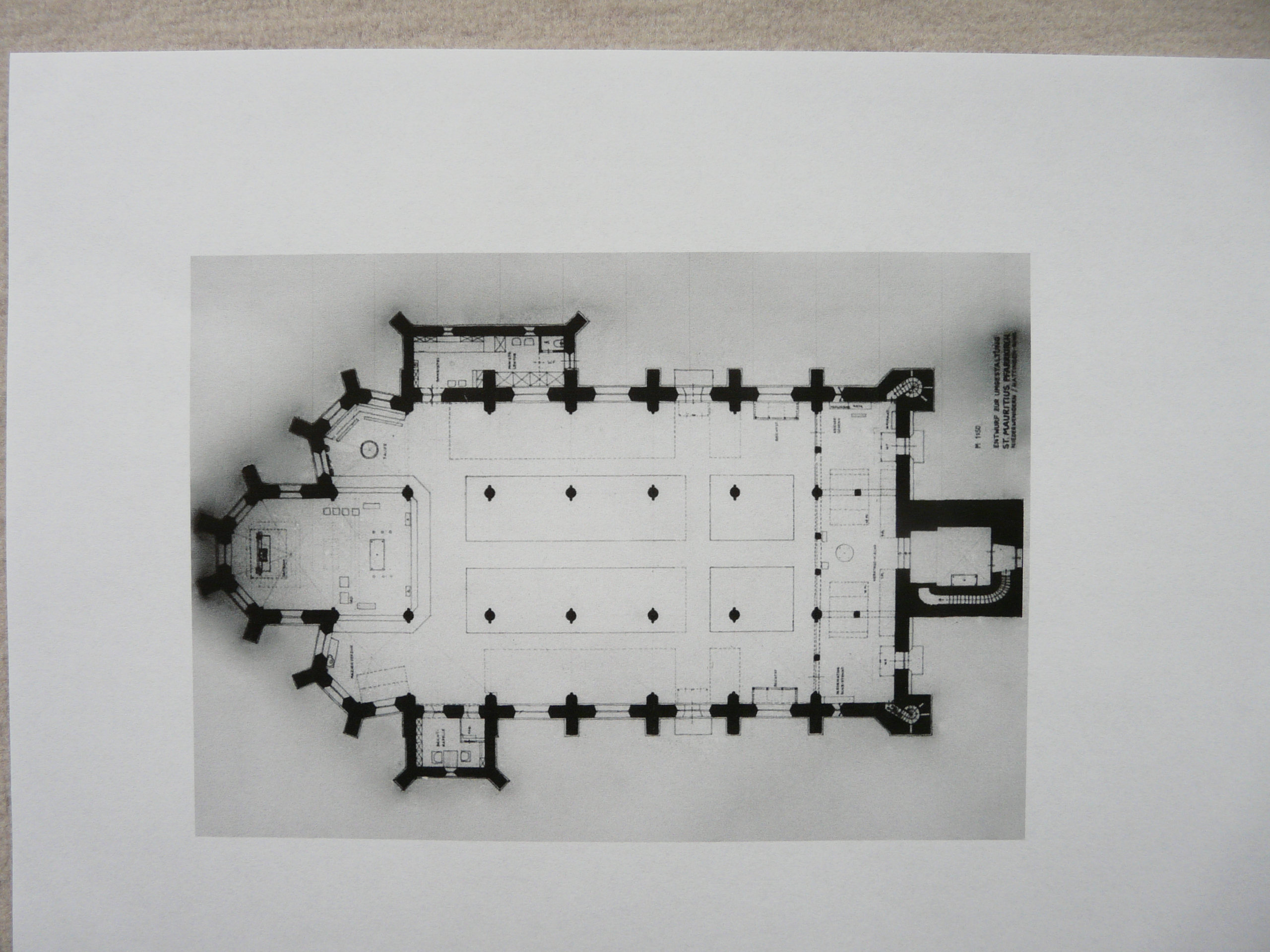 Grundriss Mauritiusdom - romanischer Turm,neugotische Hallenkirche